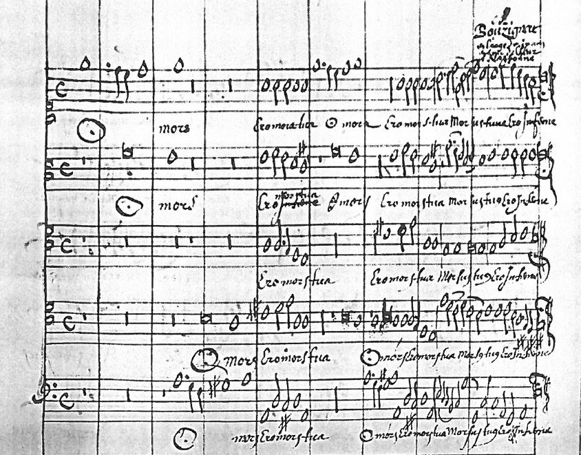 Beginning of Guillaume Bouzignac's motet O mors ero mors tua from the manuscript Tours BM : Ms. 168.